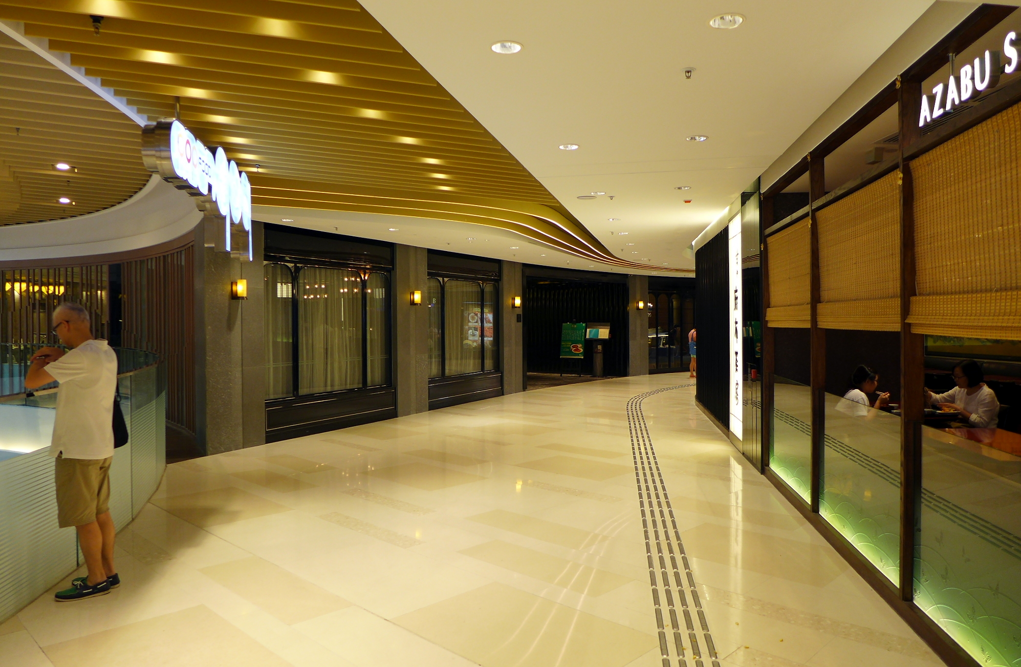 PopDeli， Tseung Kwan O